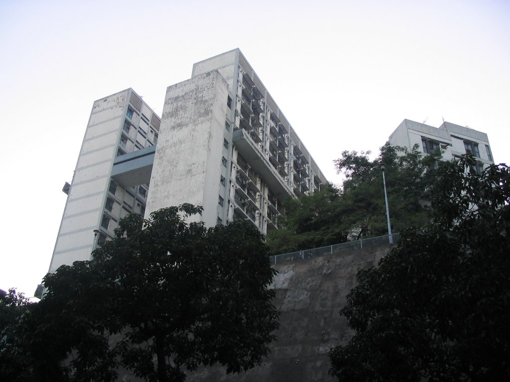 天光道前警察宿舍，即目前半山壹號所在地點